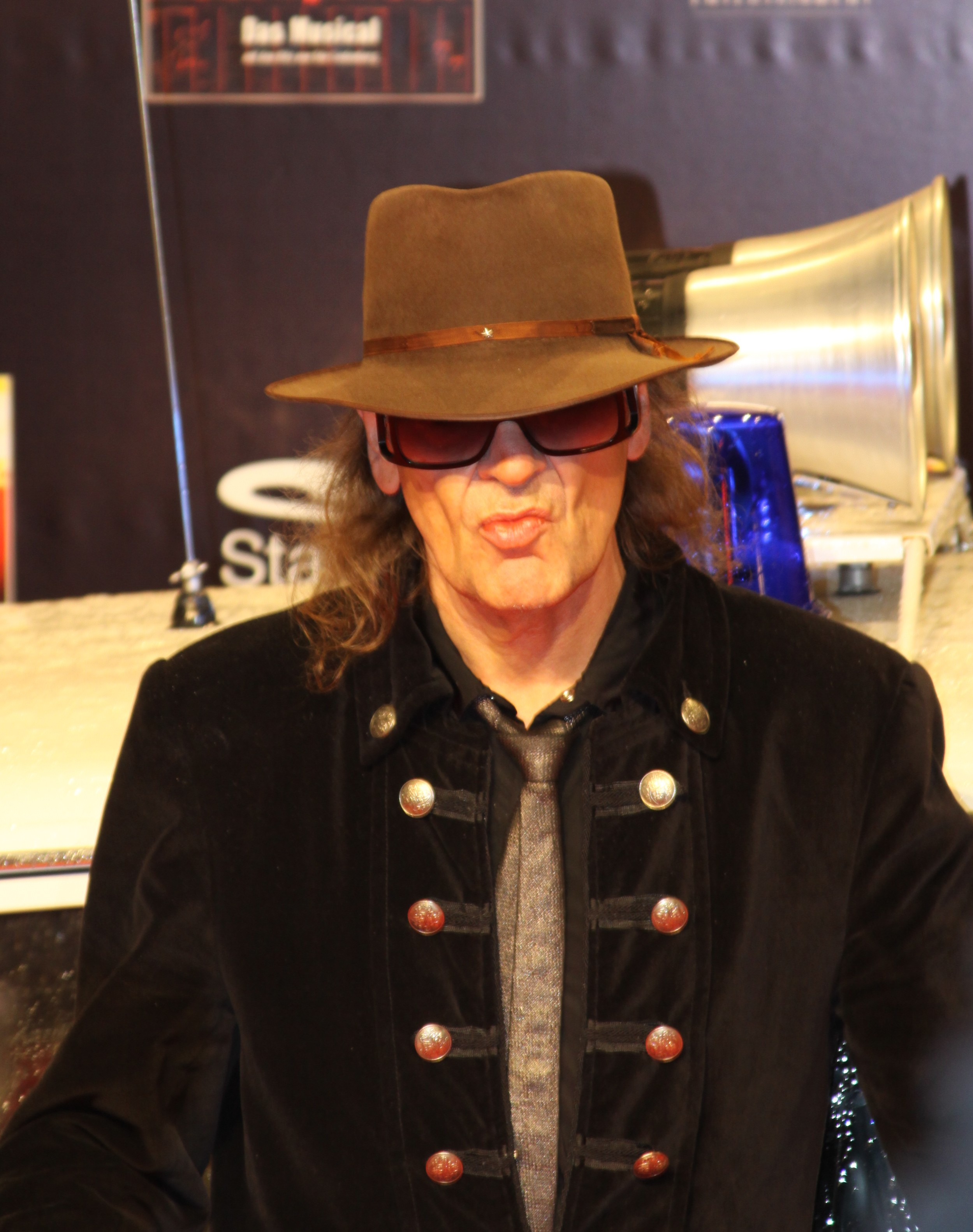 Udo Lindenberg auf der Premiere des Musical Hinterm Horizont in Berlin